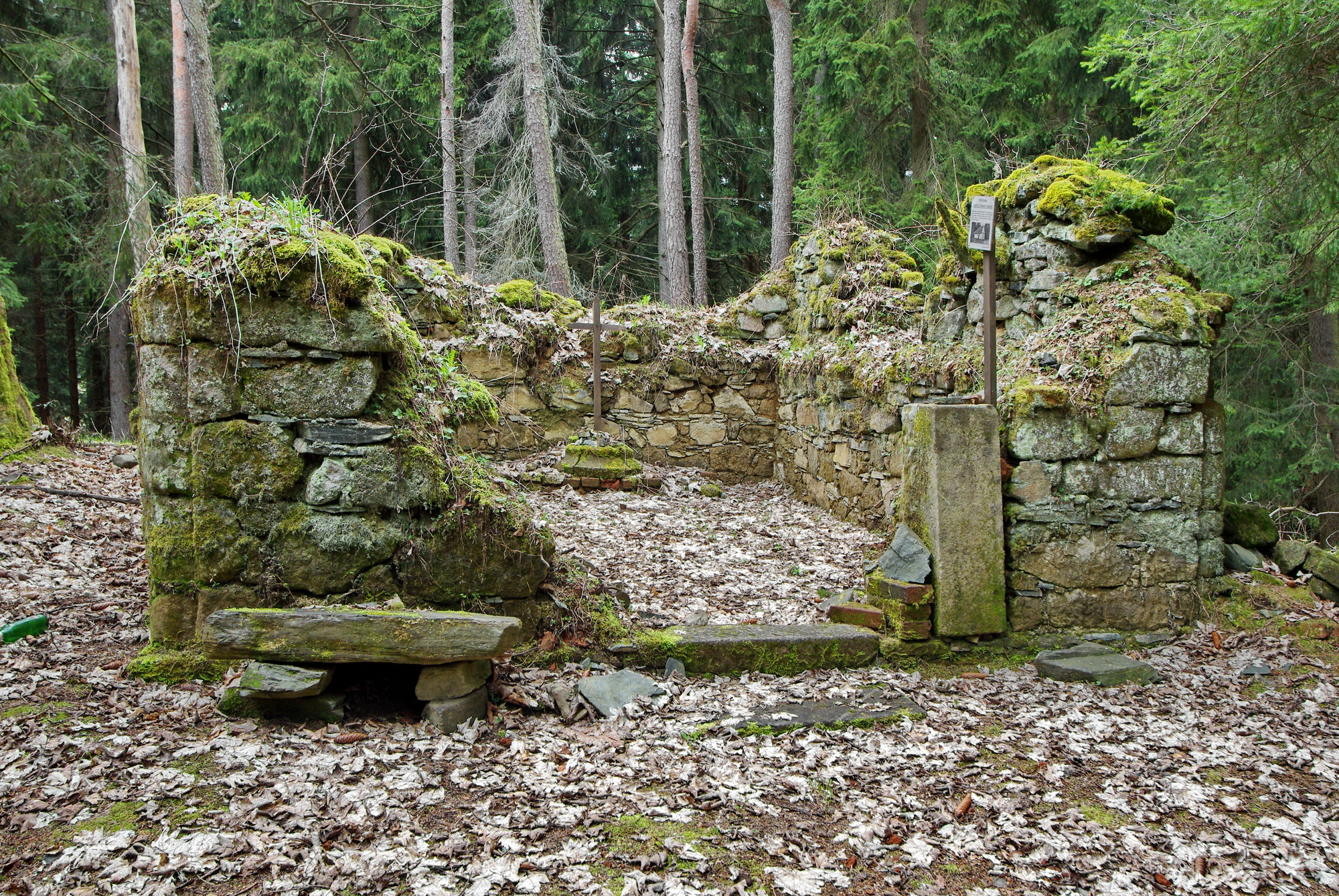 Ruiny kaple Panny Marie v lese nad obcí Prameny, vystavěné kolem roku 1750, bývalé poutní místo s křížovou cestou, okres Cheb